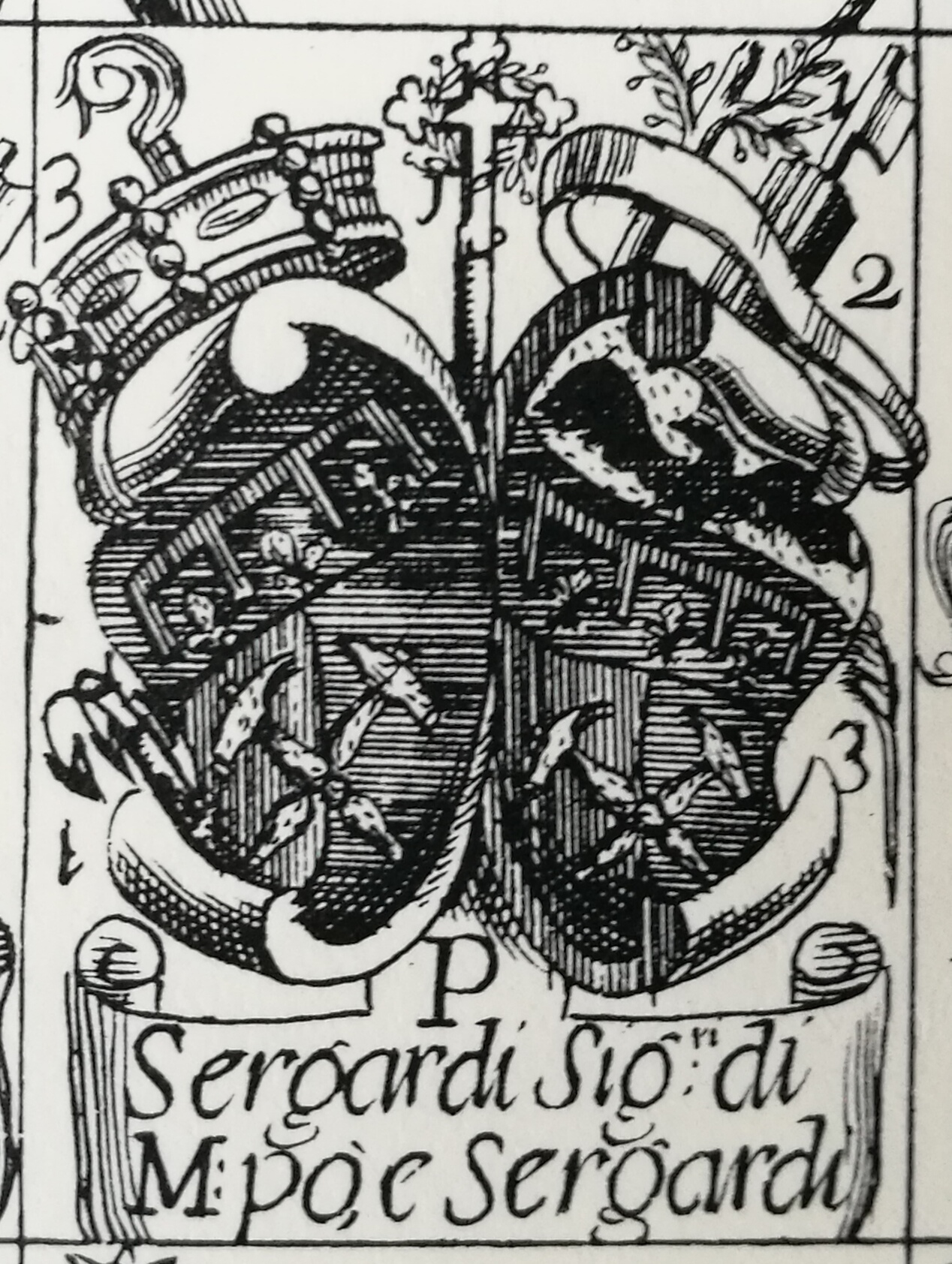 Stemmi Sergardi estratti dal blasonario del 1717 allegato al "Diario Sanese" di Girolamo Gigli del 1723 (ristampati su "Palazzo Pubblico di Siena" - MPS 1983).